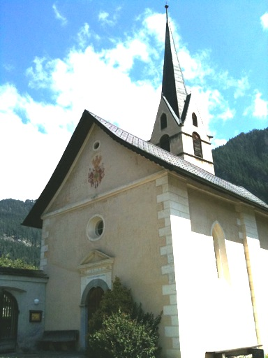 reformierte Kirche Almens, Kanton Graubünden